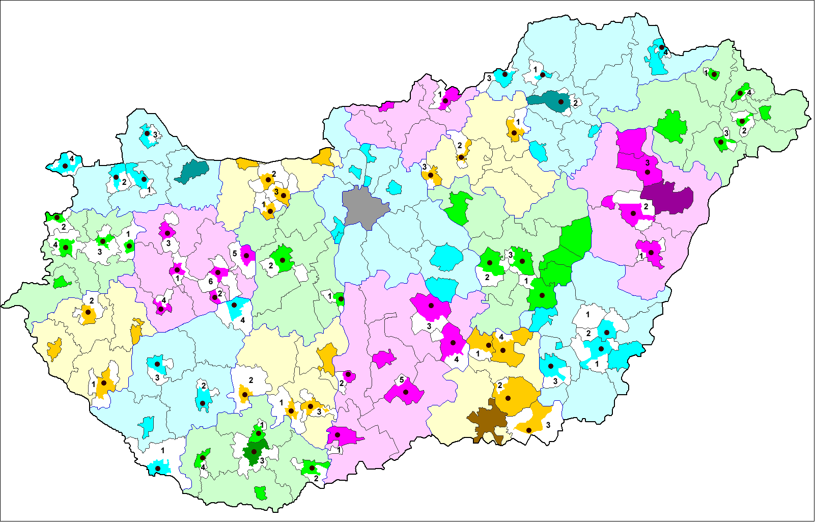 Városkörnyékek Magyarországon 1983 végén, a járások megszűnése előtt